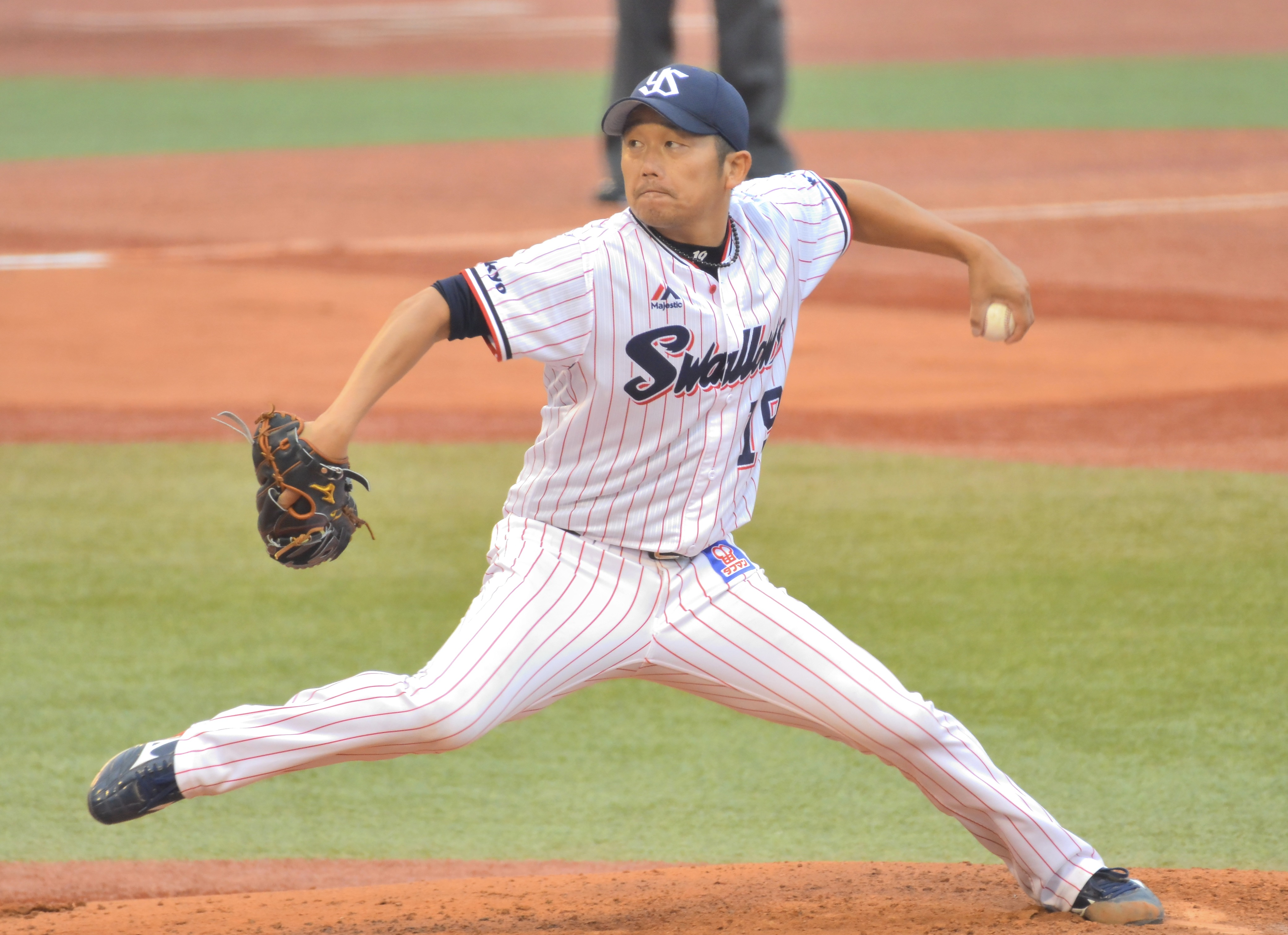 東京ヤクルトスワローズ 石川雅規 ２０１７年６月１８日 神宮球場